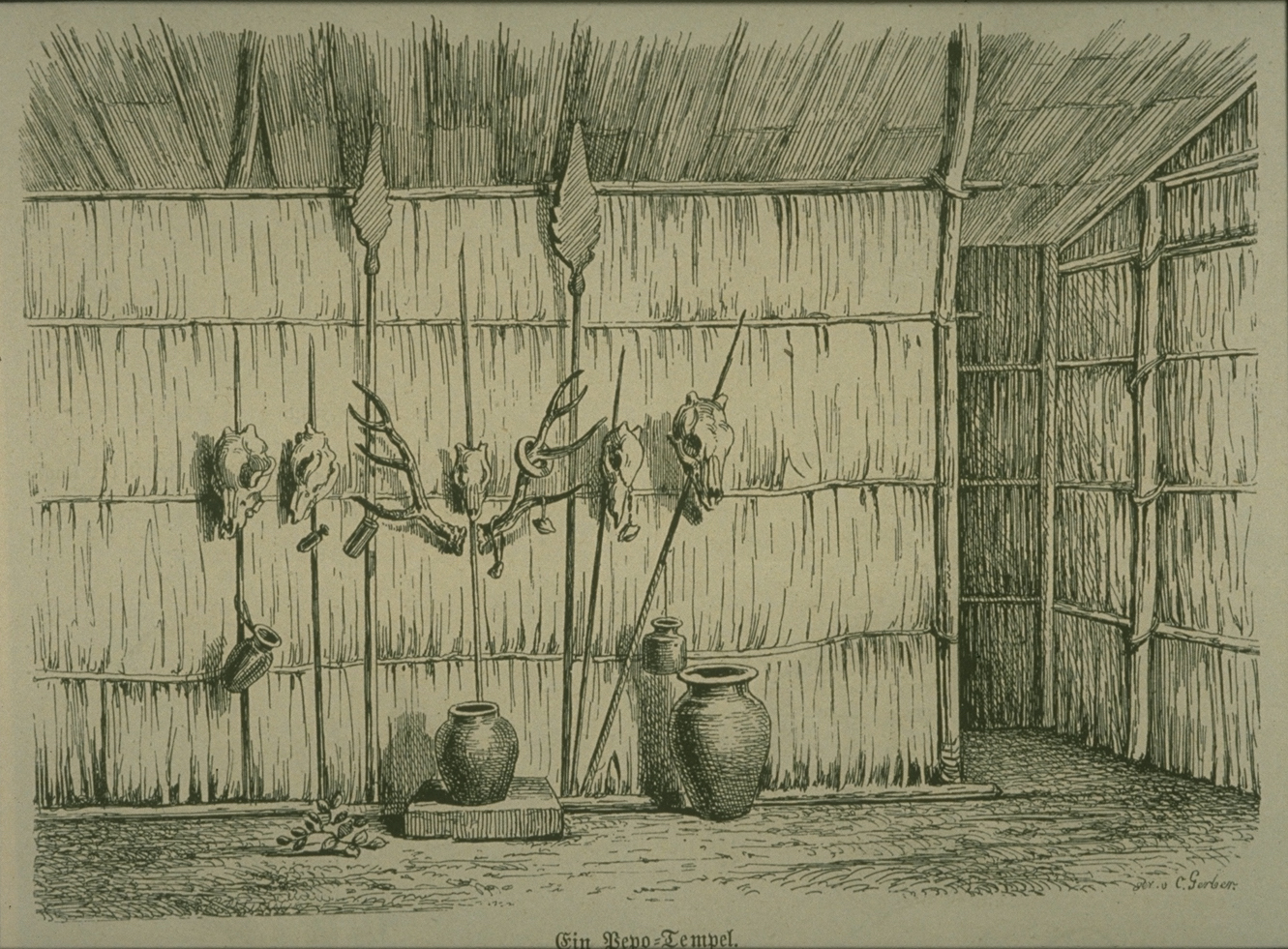 中文（台灣）: 平埔族祭祀場所，臺灣。